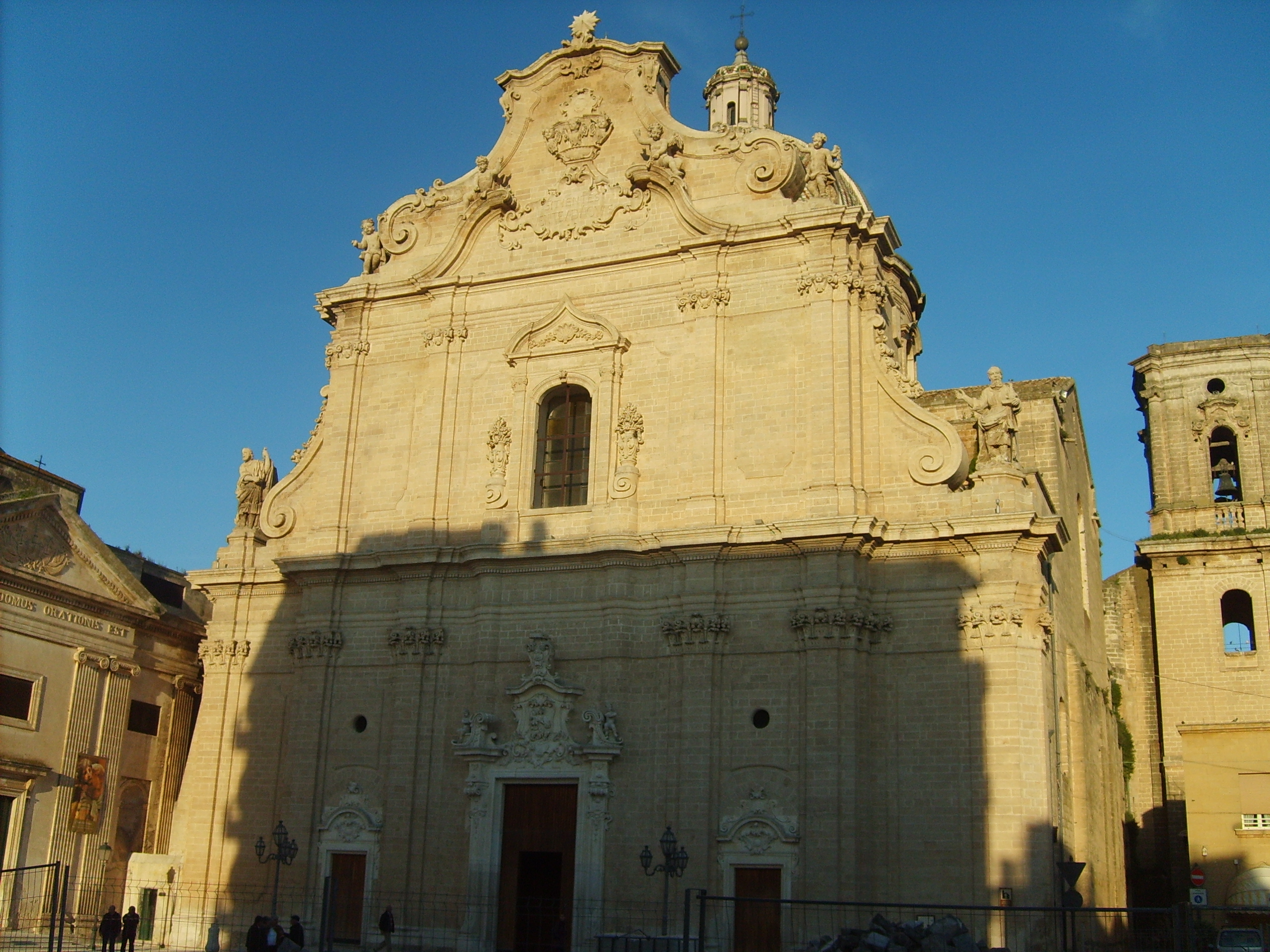 Facciata della collegiata dopo il restauro